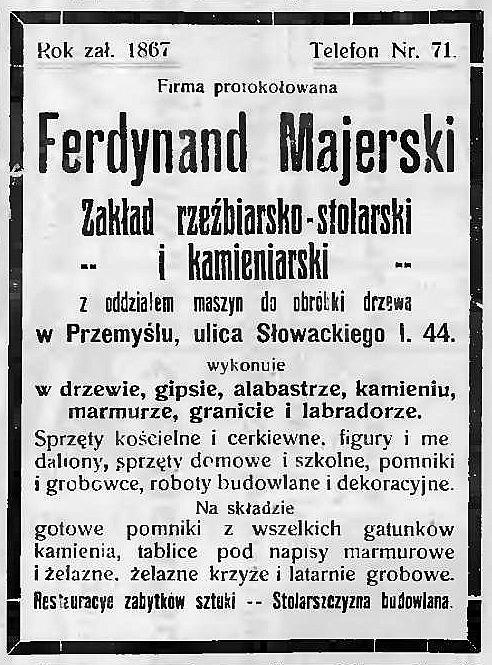 Ogłoszenie z 1912 we Lwowie. Rzeźbiarz Ferdynand Majerski.